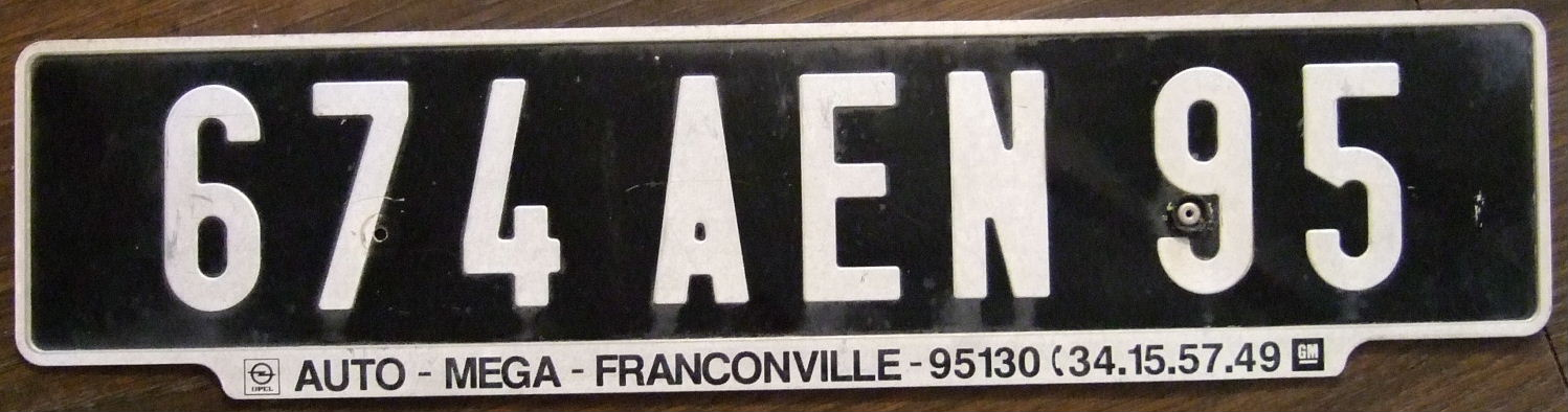 FRANCE passenger license plate 1970s